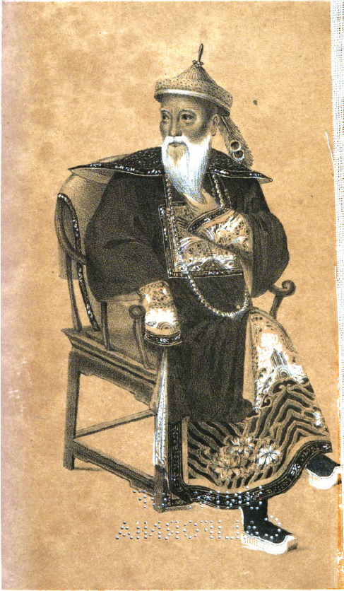 Commissioner Lin Zexu